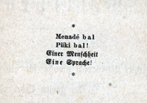 La devise du volapük au frontispice du premier ouvrage que lui consacre Schleyer en 1880, Volapük. Die Weltsprache. Entwurf einer Universalsprache für alle Gebildeten der ganzen Erde